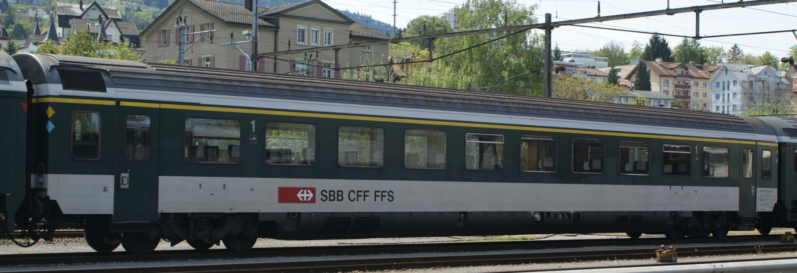 EW IV A 50 85 10-75 154-0, der zusammen mit Wagen 153 als Versuchsträger für eine vollständige Verschalung der Apparate unter dem Wagenboden im Hinblick auf einen EW V diente. Eingereiht in eine abgestellten Zugskomposition in Rorschach